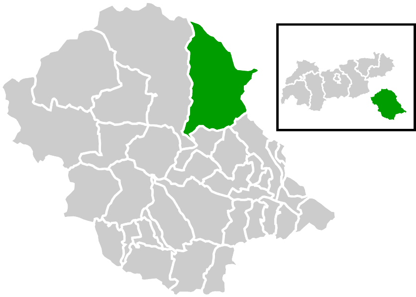 Lage der Gemeinde innerhalb des Bezirks Lienz